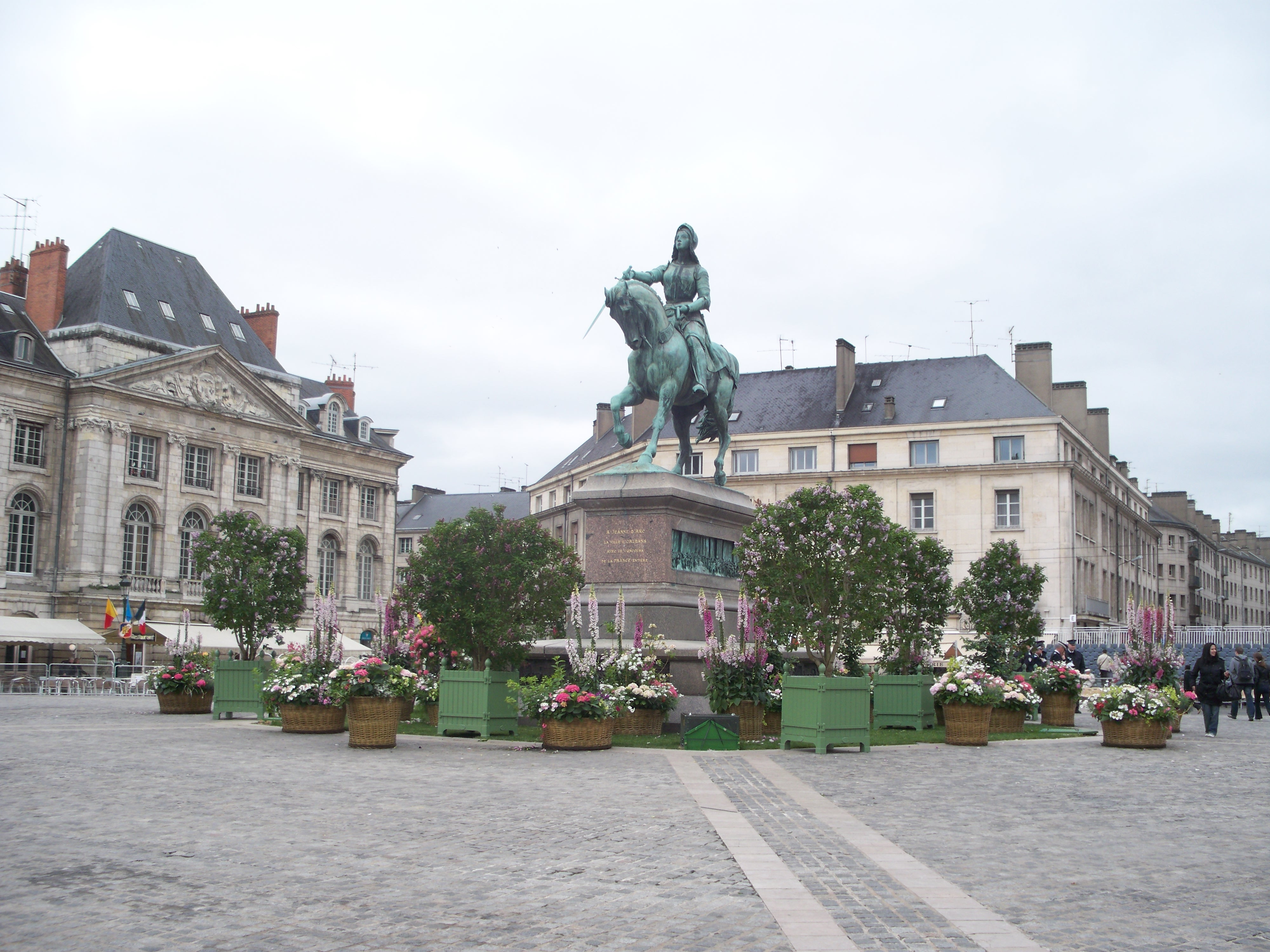 Statuaire équestre de Jeanne d'Arc à Orléans, Place du Martroi